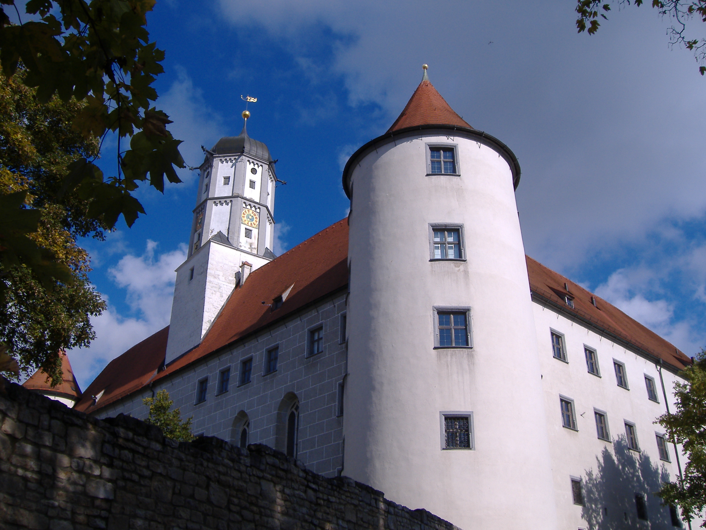 Höchstädt